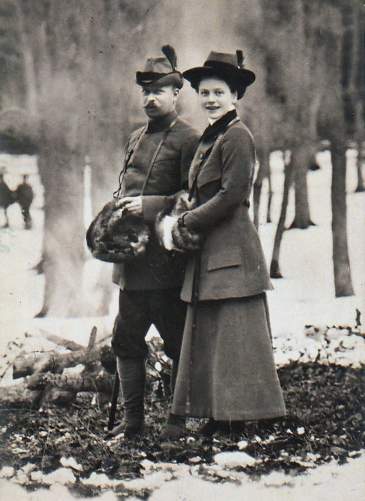 Herzog Johann Albrecht und Herzogin Elisabeth, winterlicher Ausflug 1910